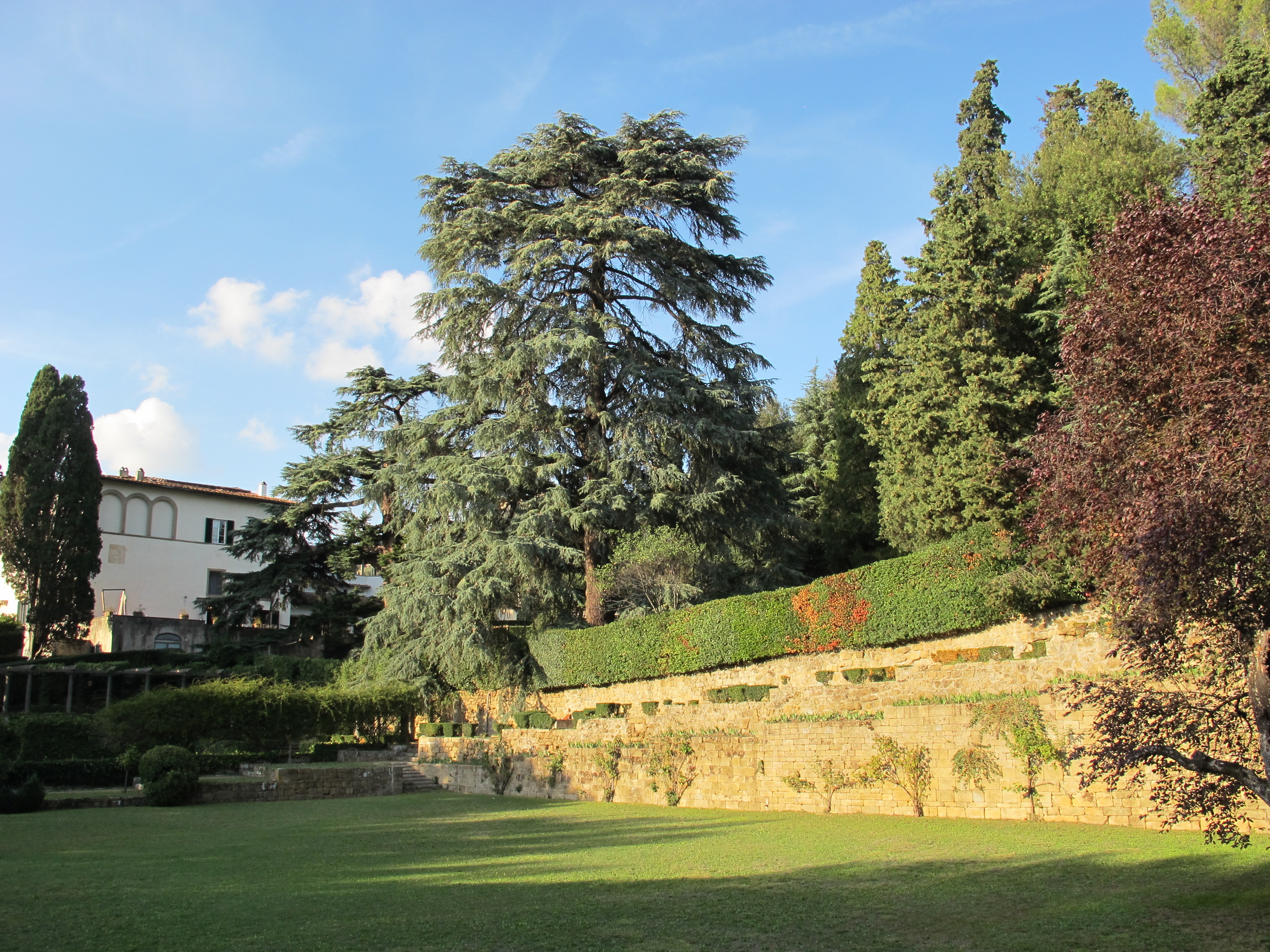 Villa la fonte, parco, pratone del cricket